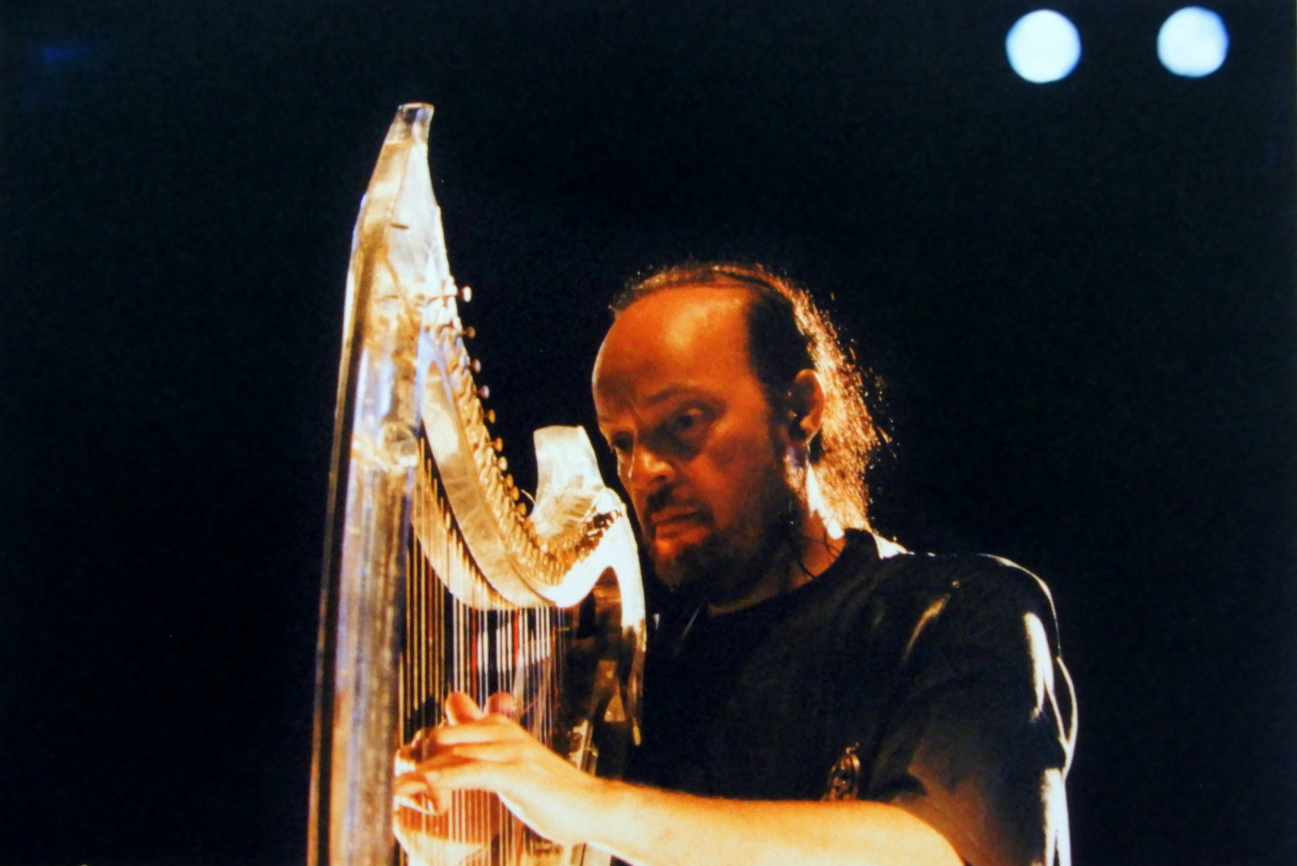 Alan Stivell en concert dans le cadre de la tournée Brian Boru en Bretagne à La Baule au parc des Driades le 17 juillet 1996.